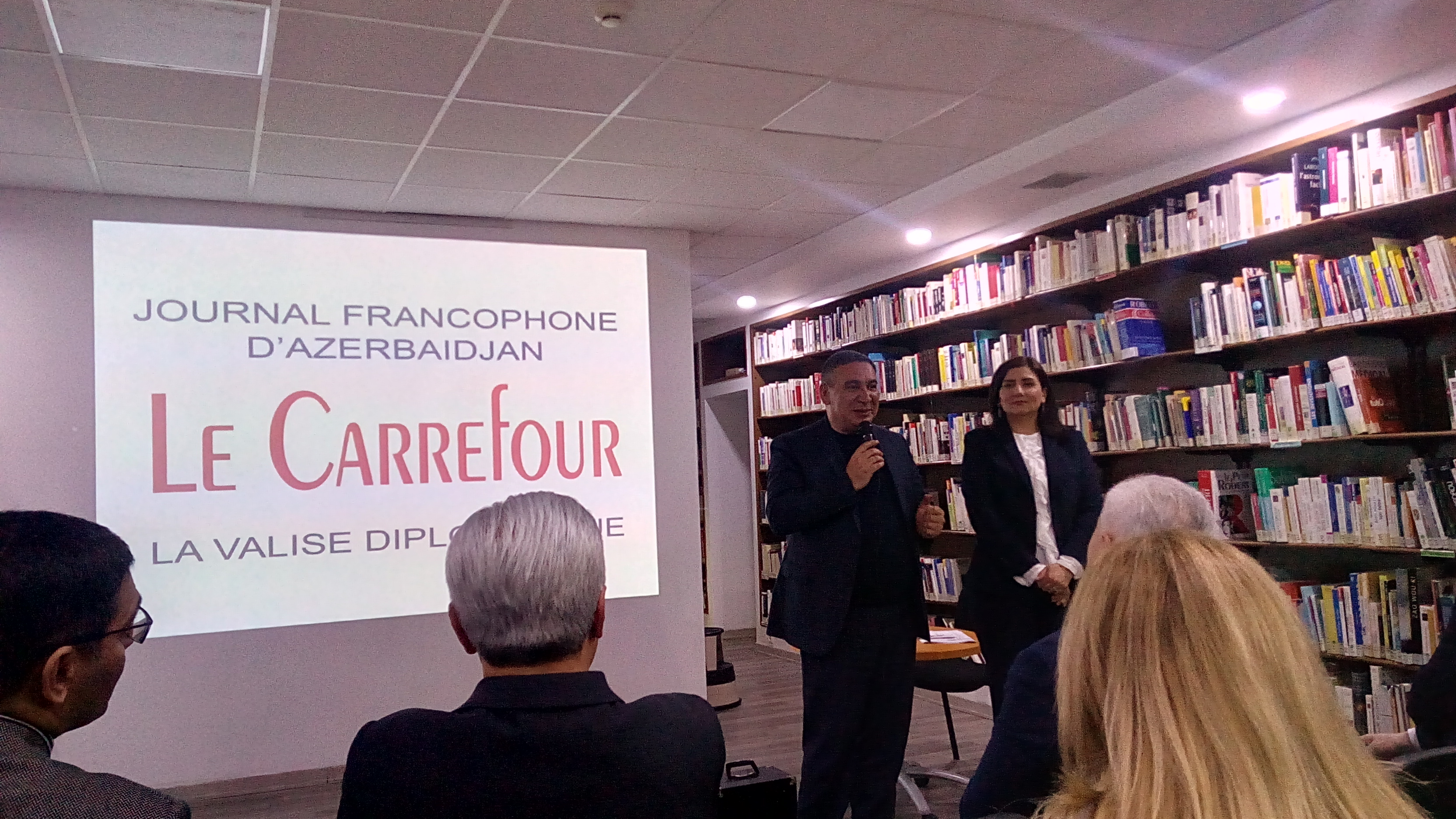 Azərbaycandakı Fransız İnstitutunda Le Carrefour qəzetinin təqdimatı